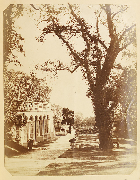 Teitl Cymraeg/Welsh title: Yr Orendy, Margam Dyddiad/Date: 185- Cyfeiriad/Reference: vin00094 (pb02377/054) Rhif cofnod / Record no.: 3590002 Rhagor o wybodaeth am Ffotograffiaeth Gynnar Abertawe yn Llyfrgell Genedlaethol Cymru More information about Early Swansea Photography at the National Library of Wales